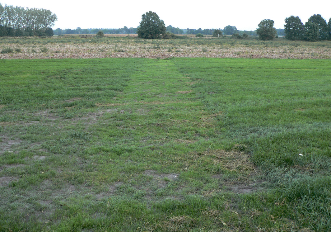 Grabungsschnitt auf der Burg Wahrenholz